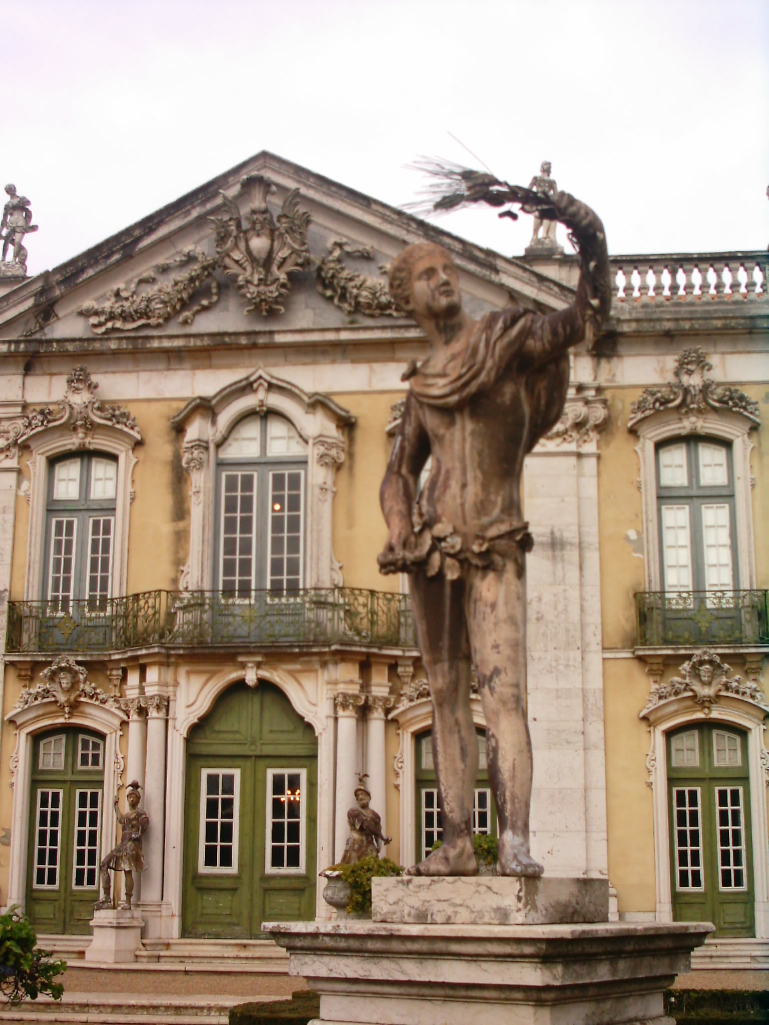 Palácio de Queluz, Portugal. Vista dos jardins do palácio para as fachadas.